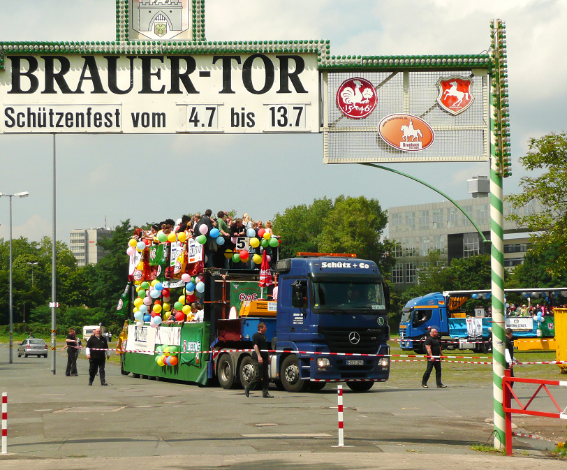 Schlagermove startet auf Schützenplatz Hannover